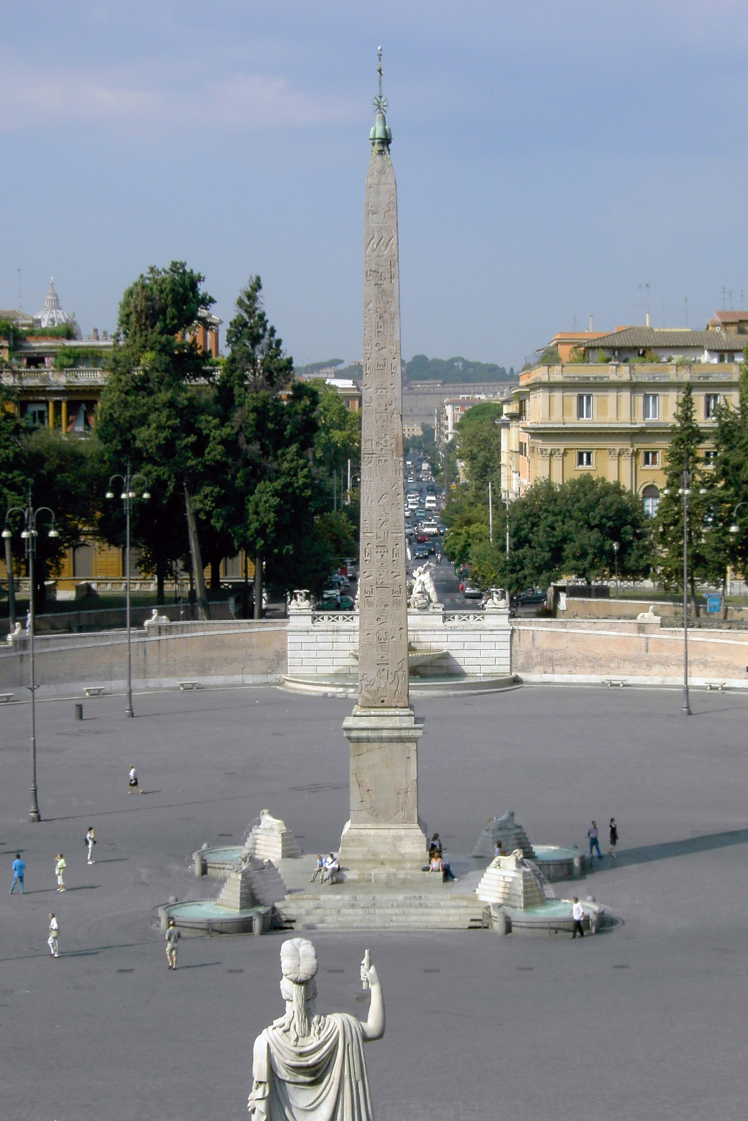 Obelisk auf der Piazza del Popolo - Rom Quelle: Fotografiert von Martin Knopp am 6.9.2004 Genehmigung zur Veröffentlichung bei Wikipedia wurde durch den Fotografen erteilt. 20:52, 7. Apr 2005 Maus-Trauden 1920 x 2560 (829498 Byte) (Obelisk auf der Piazza di Popolo - Rom)